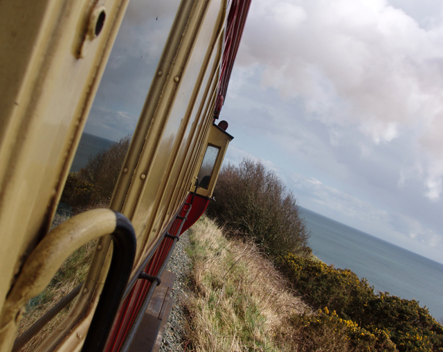 Вид из вагона поезда на участке от Сантона до Балласаллы железной дороги Острова Мэн